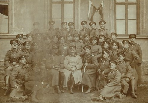 Военнослужещи от Лейбгвардейския конен полк. Присъстват командирът на ескадрон към полка майор И. Кикименов, офицерите Стоев, Лажев, Г. Иванов и конници.